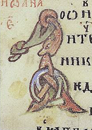 Беларуская (тарашкевіца): Ініцыял з Лаўрышаўскага Эвангельля